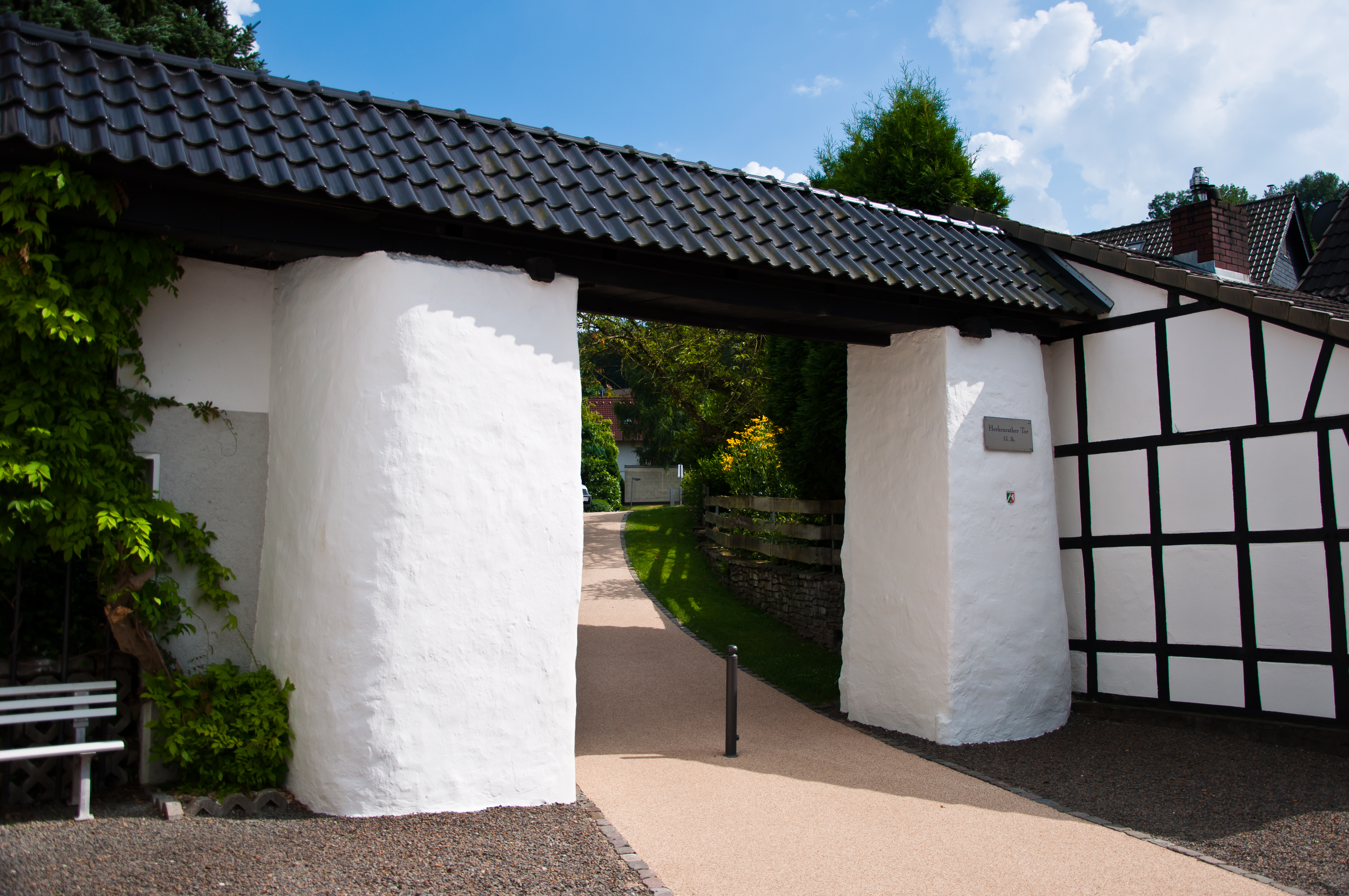 Das Herkenrather Tor von der Kürtener Straße aus.